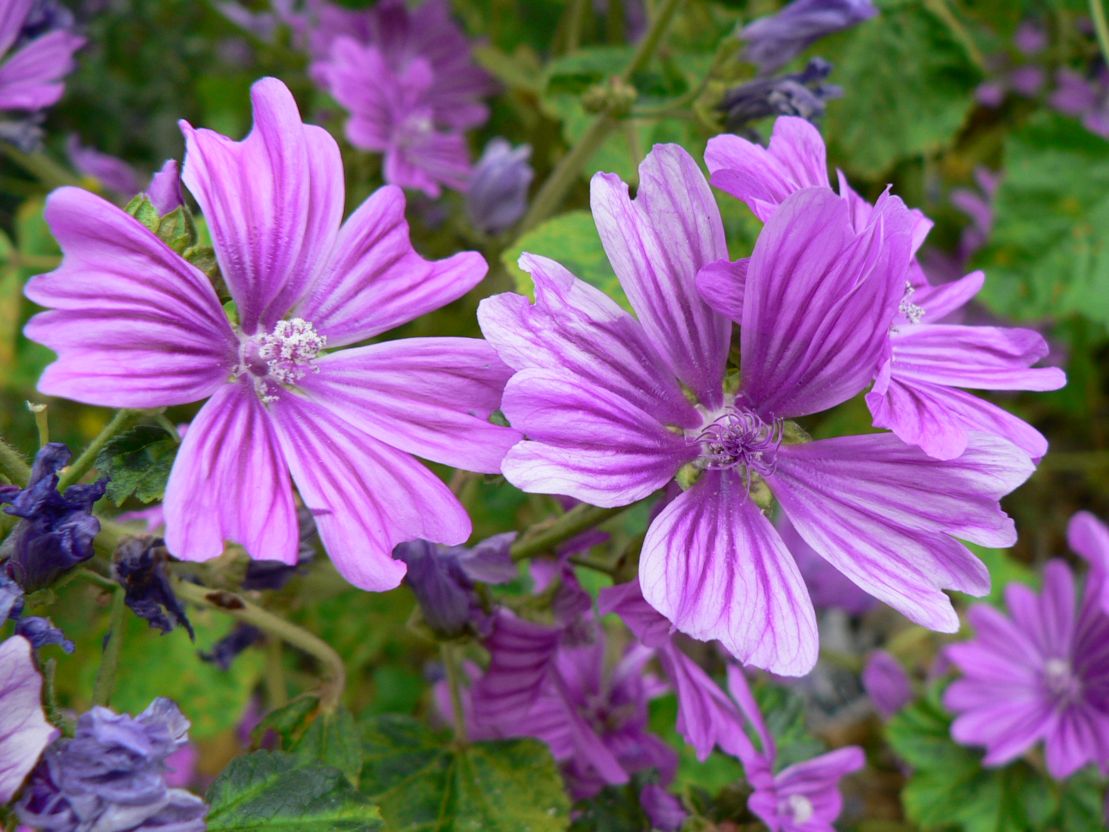 Flores de malva (malva sylvestris) en un descampado de Madrid.